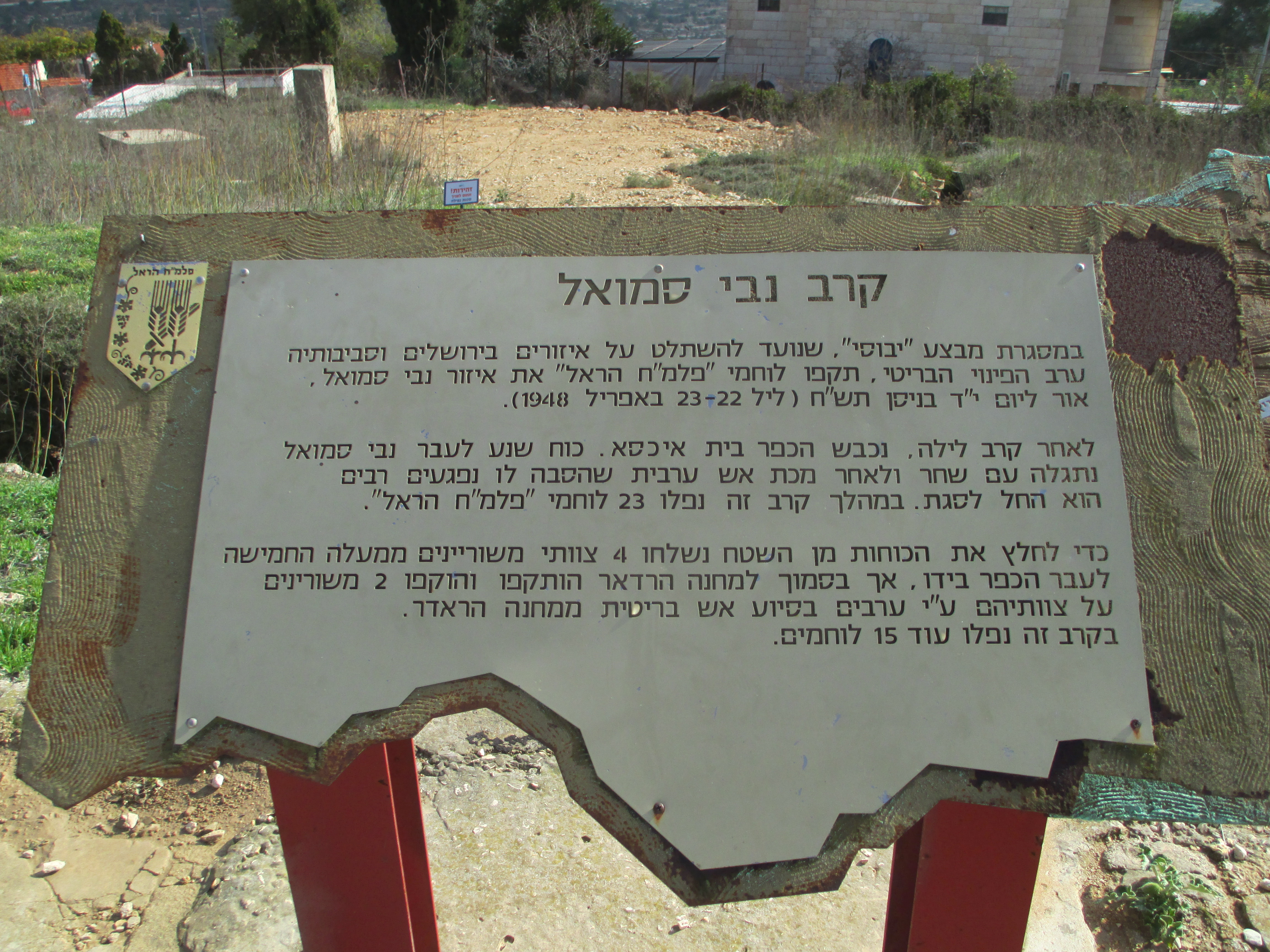 שלט זיכרון לקרב נבי סמואל - בגבעת הרדאר